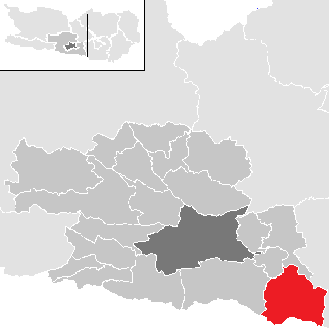 Bezirk Villach-Land